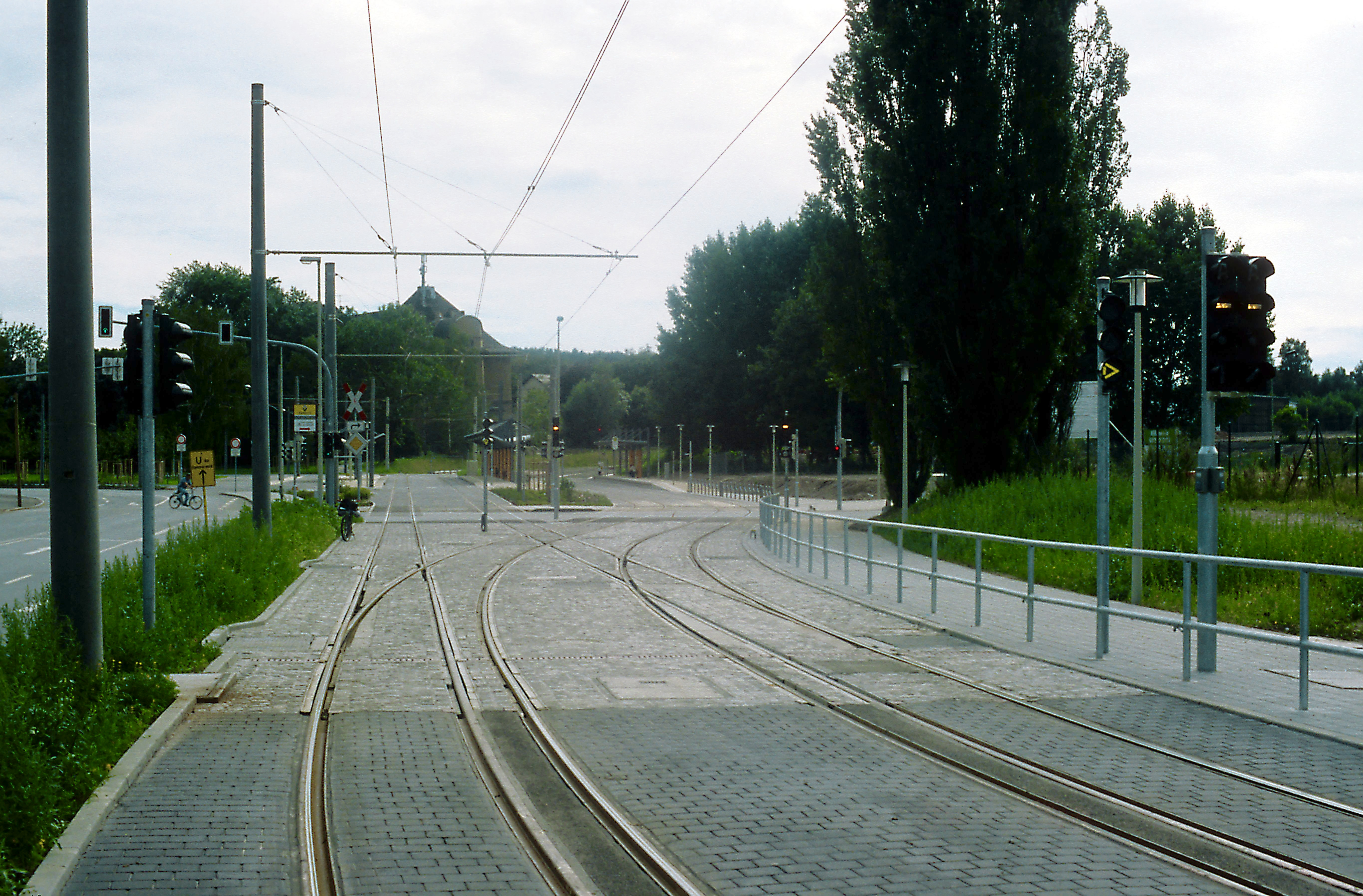 Noch enden die Meterspurgleise im Bildhintergrund, die Strecke Richtung Neuplanitz ist in Arbeit, die Regelspur führt nach rechts zum Hauptbahnhof.